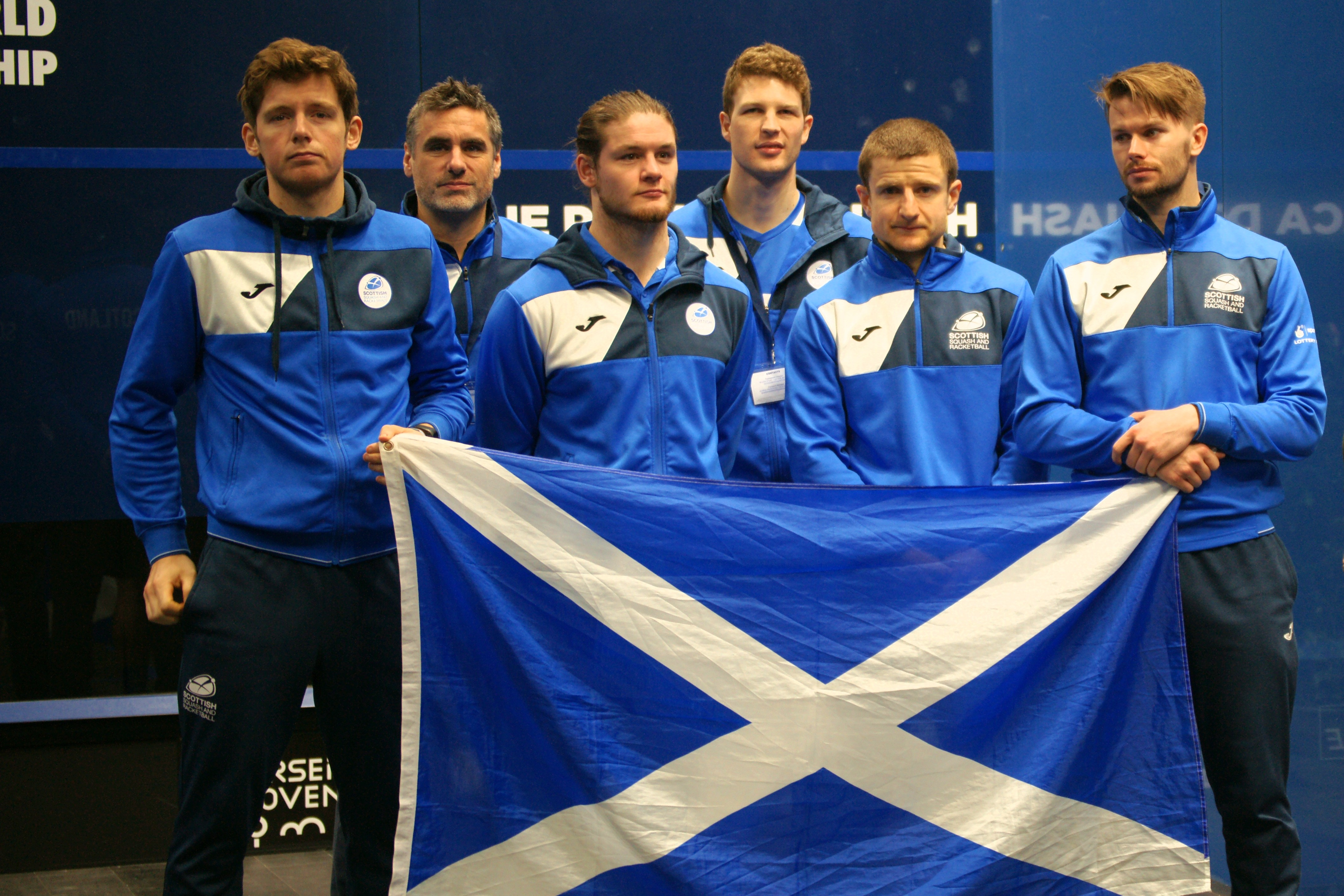 équipe d'Écosse, championnats du monde de squash par équipe Marseille 2017